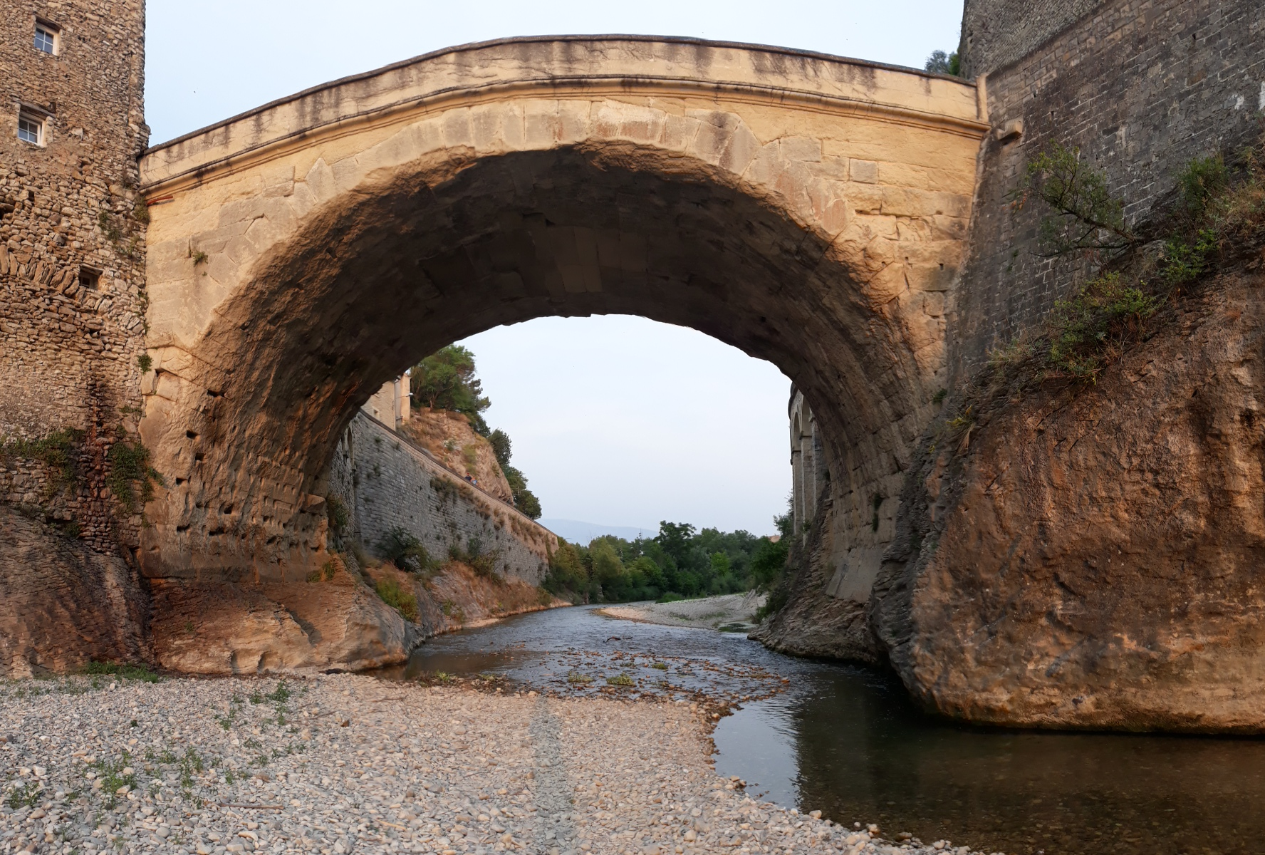 Pont de Vaison-la-Romaine